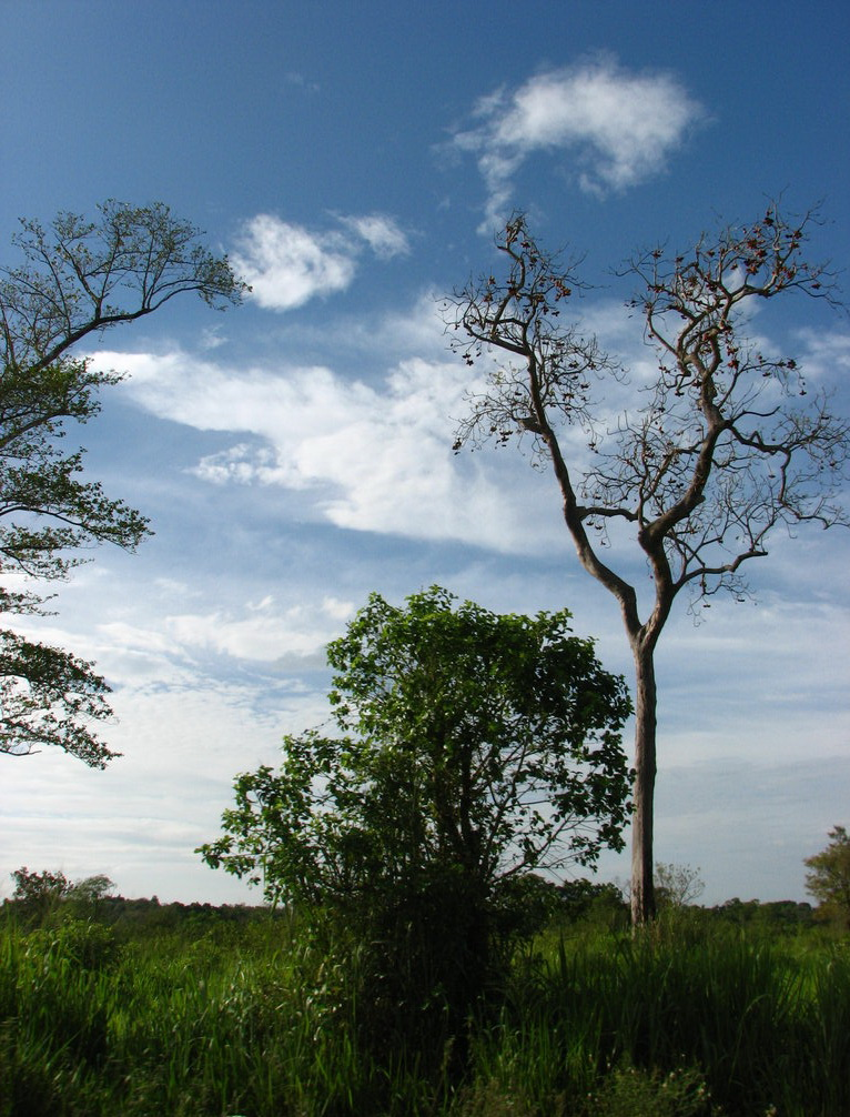 Maduru Oya National Park in Sri Lanka